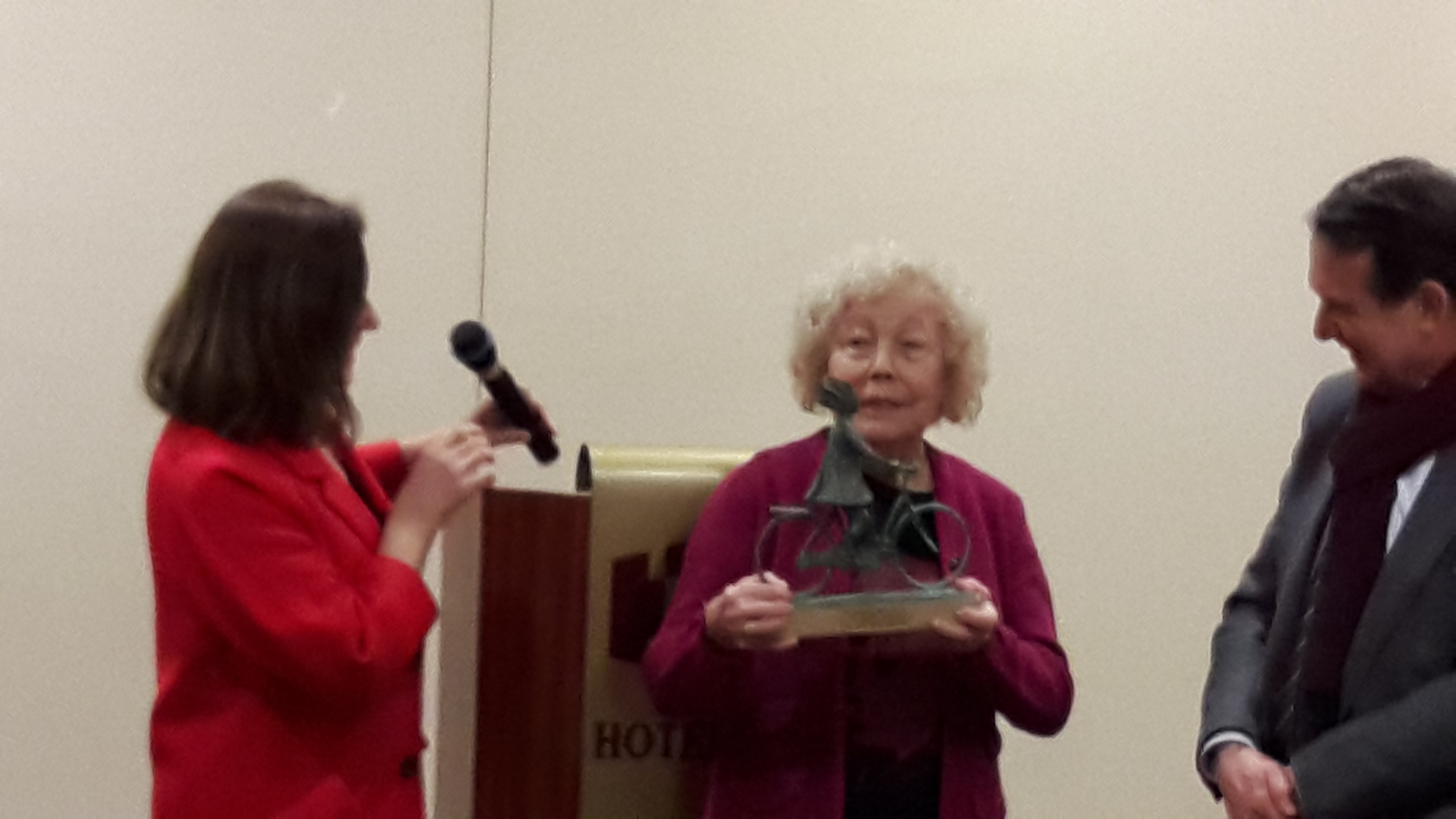 María Xosé Queizán recolle o premio de mans da Concelleira Uxía Blanco en presenza do alcalde Abel Caballero en Vigo no mes de marzo do 2019